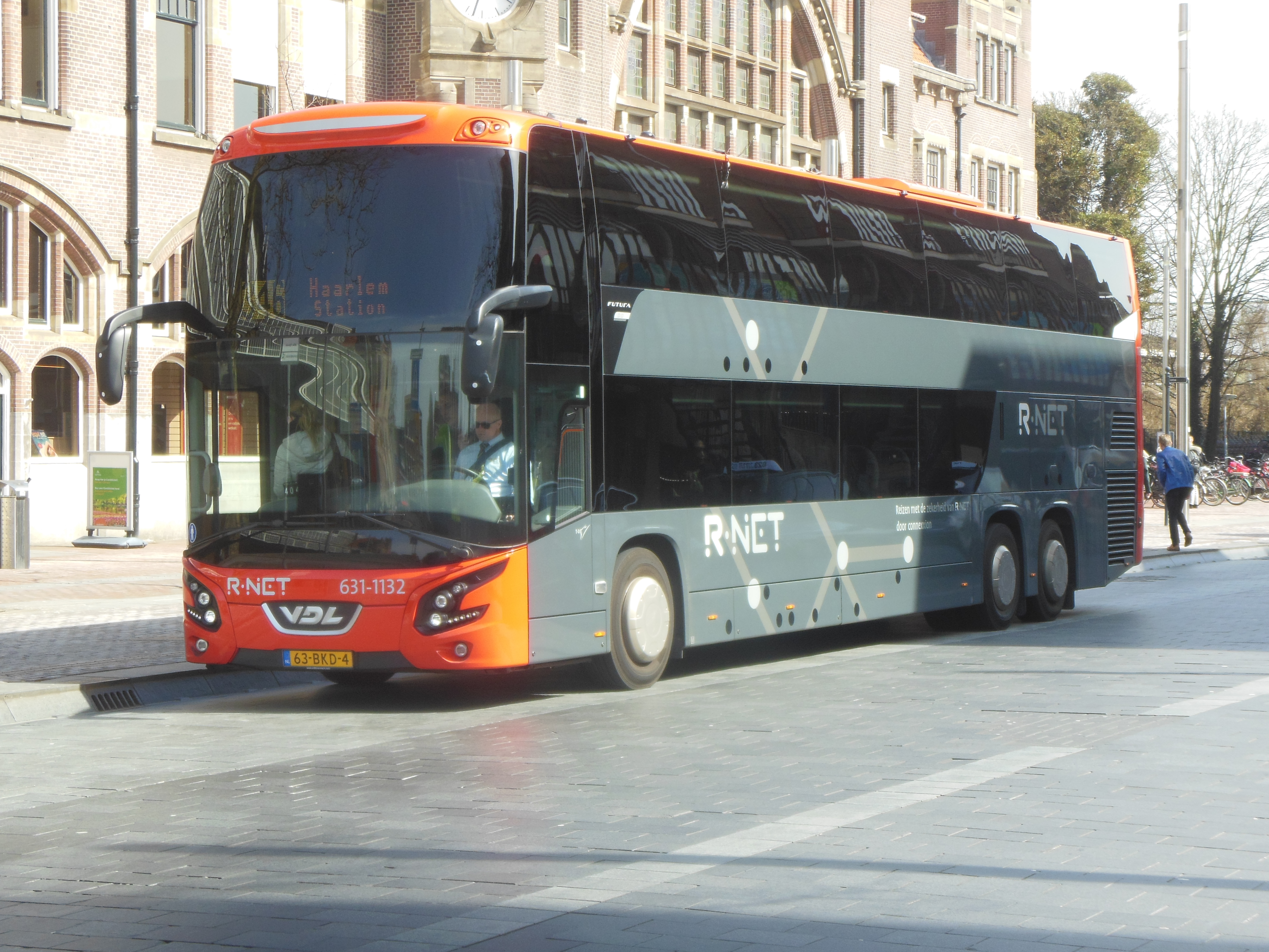 VDL Futura 631 van Taxi Centrale Renesse te Haarlem.